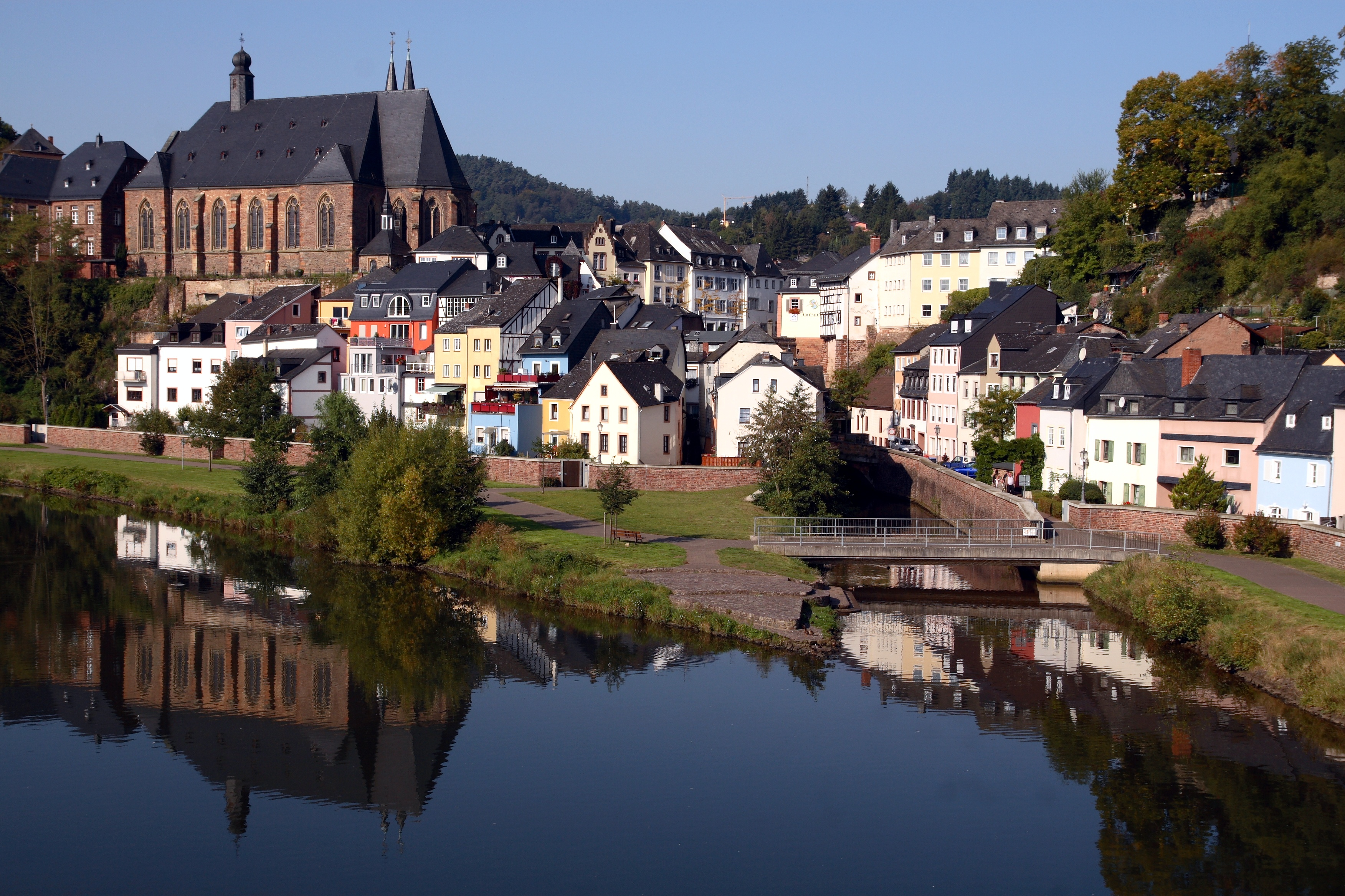 Saarburg, Rheinland-Pfalz, Germany